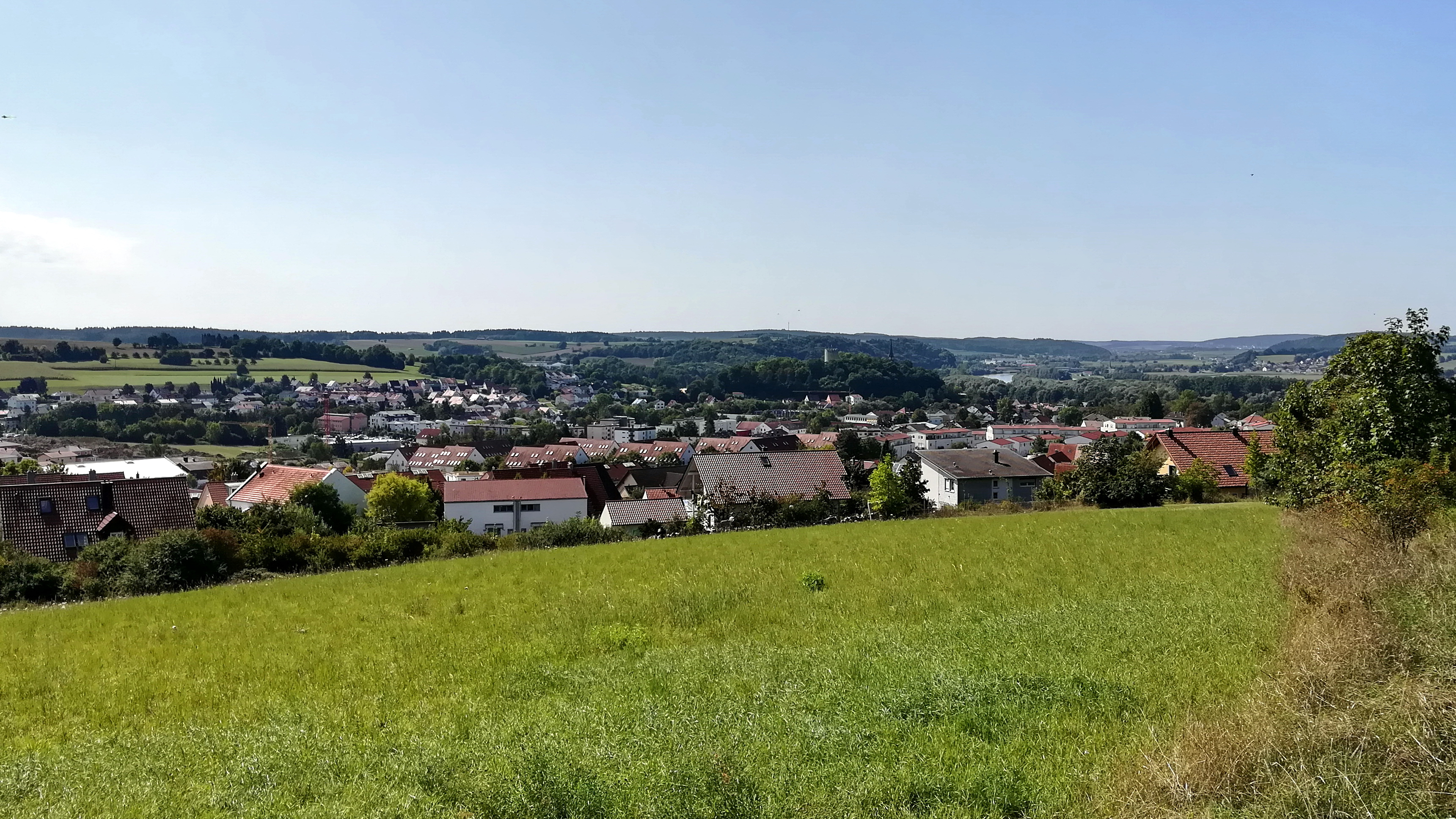 Bad Abbach (bis 1934 Abbach, wird im Volksmund noch heute so bezeichnet) ist ein Markt und Kurort im niederbayerischen Landkreis Kelheim.